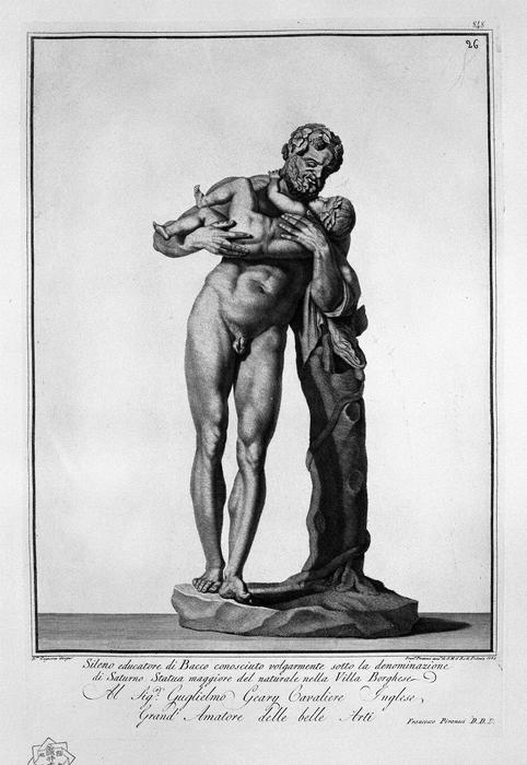 Gravure de Giovanni Battista Piranesi représentant la statue antique Silène et Bacchus (